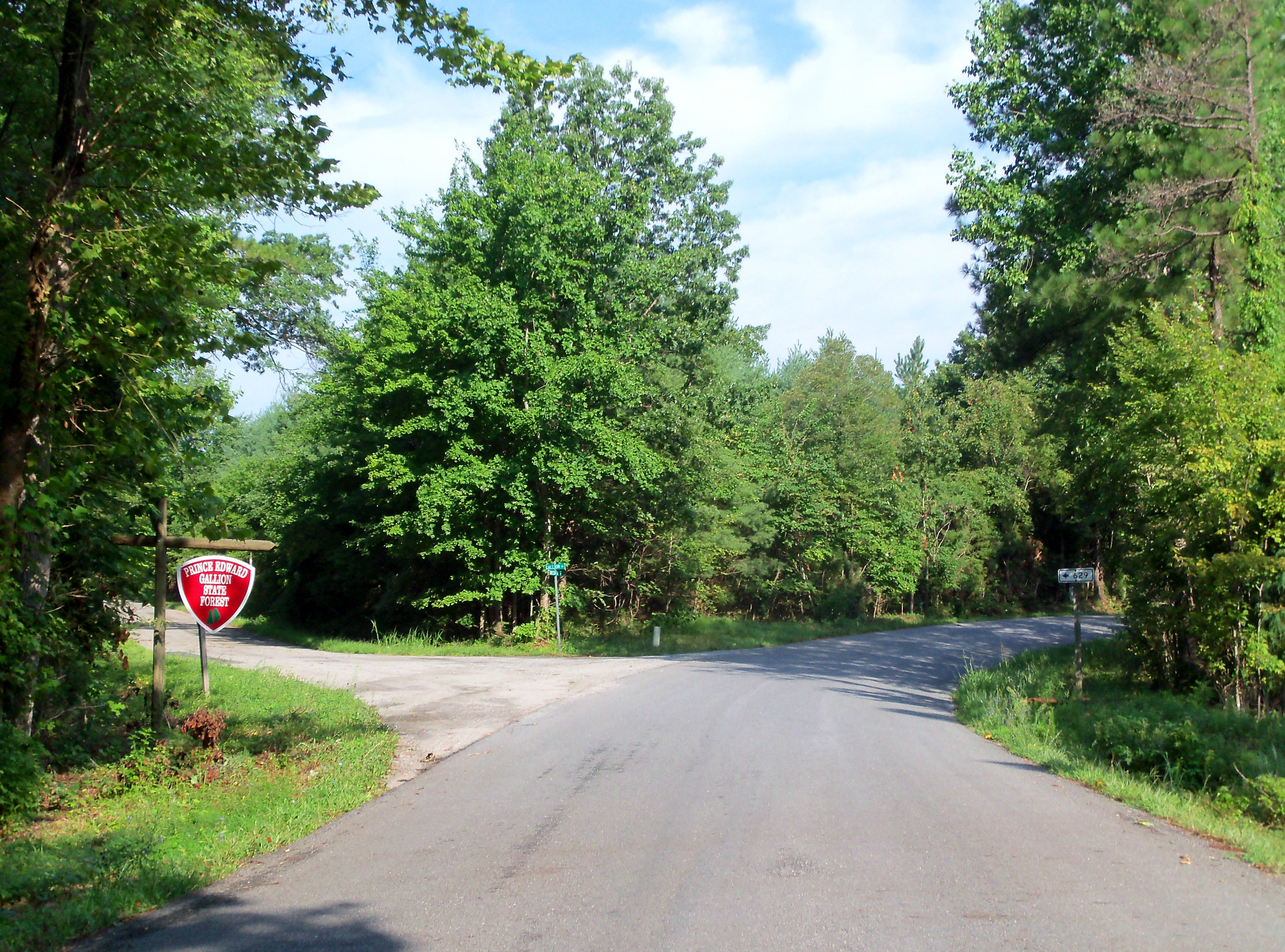 301, VA, USA